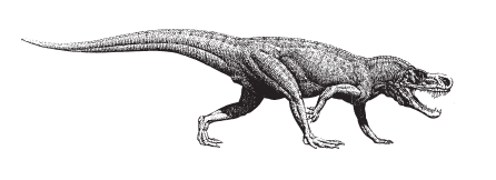 Postosuchus kirkpatricki, ein obertriassischer Rauisuchier aus dem Petrified Forest National Park, Arizona (USA).